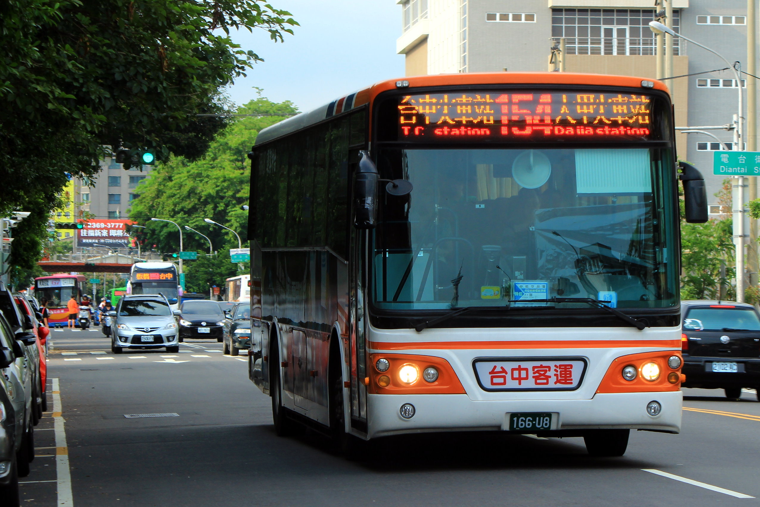 中文（台灣）: 2013〈2013〉 DAEWOO BC211MA（馨盛）